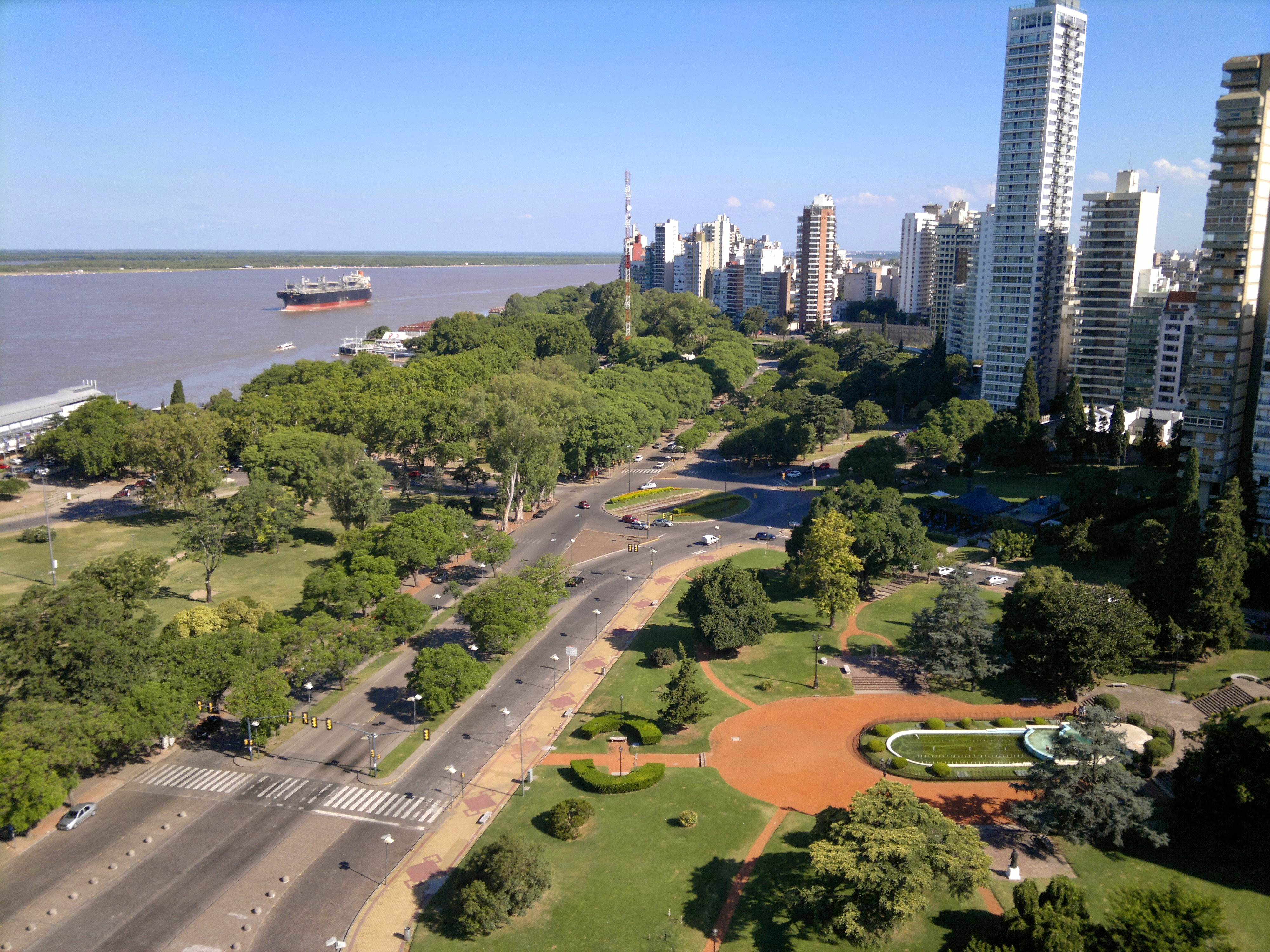 Vista desde el mirador del Monumento Historico Nacional a la Bandera